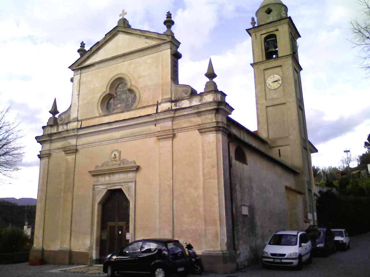 Chiesa di San Giorgio della frazione di Sanda in Celle Ligure (Italy)